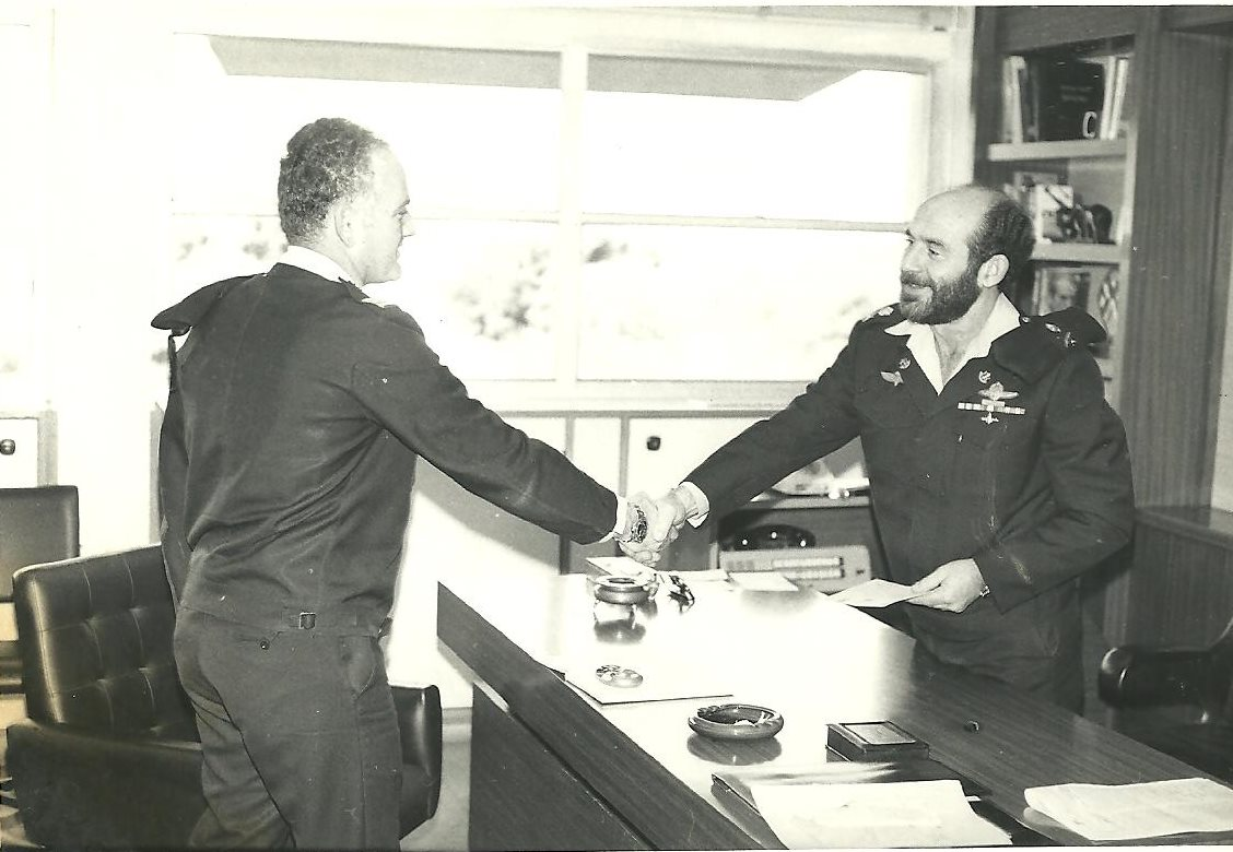 מפקד חיל הים אלוף מיכאל ברקאי מעניק דרגת רס"ן לאמנון צור ממספן המודיעין.